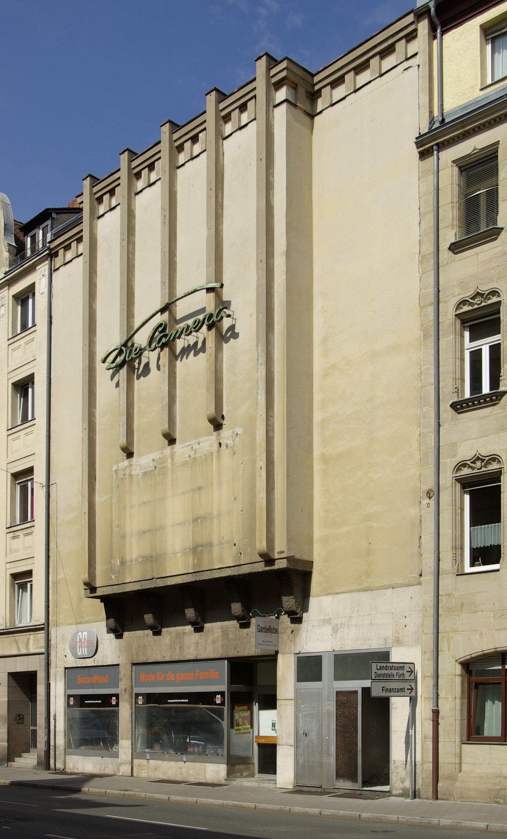 Ehemaliges Kino Die Camera, Schwabacher Straße 149, Fürth